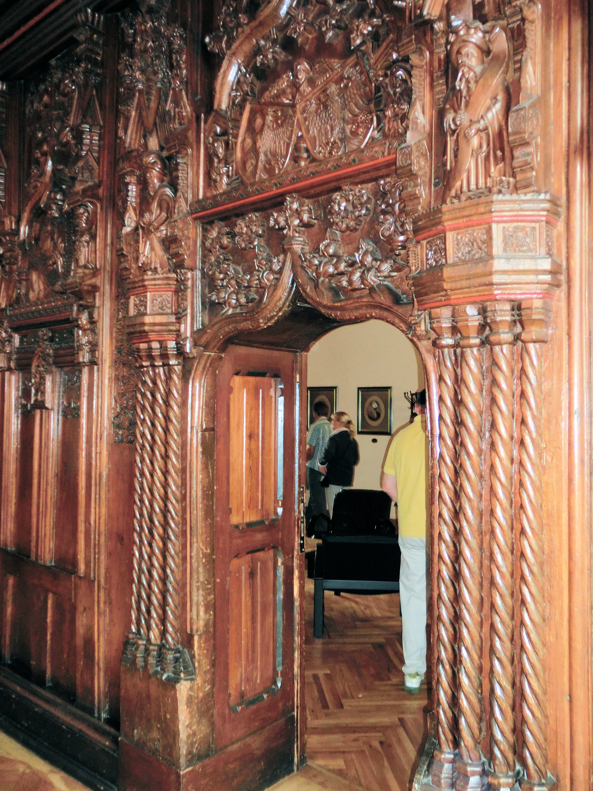 Stendal Rathaus Schnitzwerk